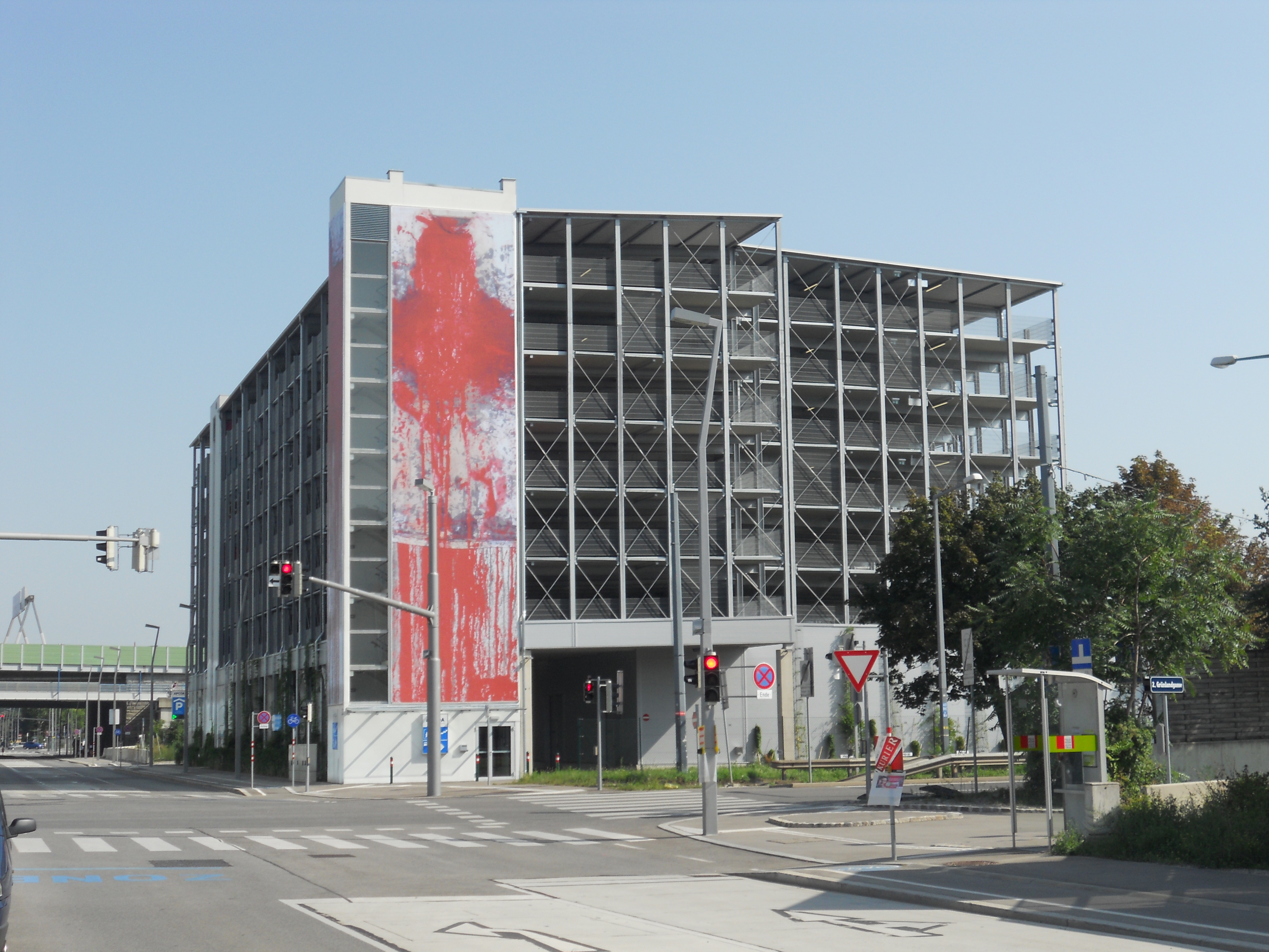 Das Parkhaus bei der Donaumarina. Die Schüttdekoration stammt von Hermann Nitsch.